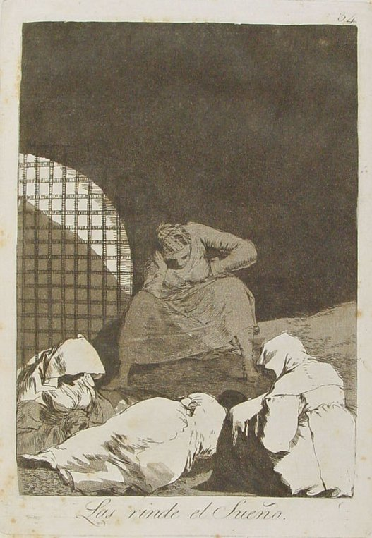 Capricho nº 34: Las rinde el sueño de Goya, serie Los Caprichos